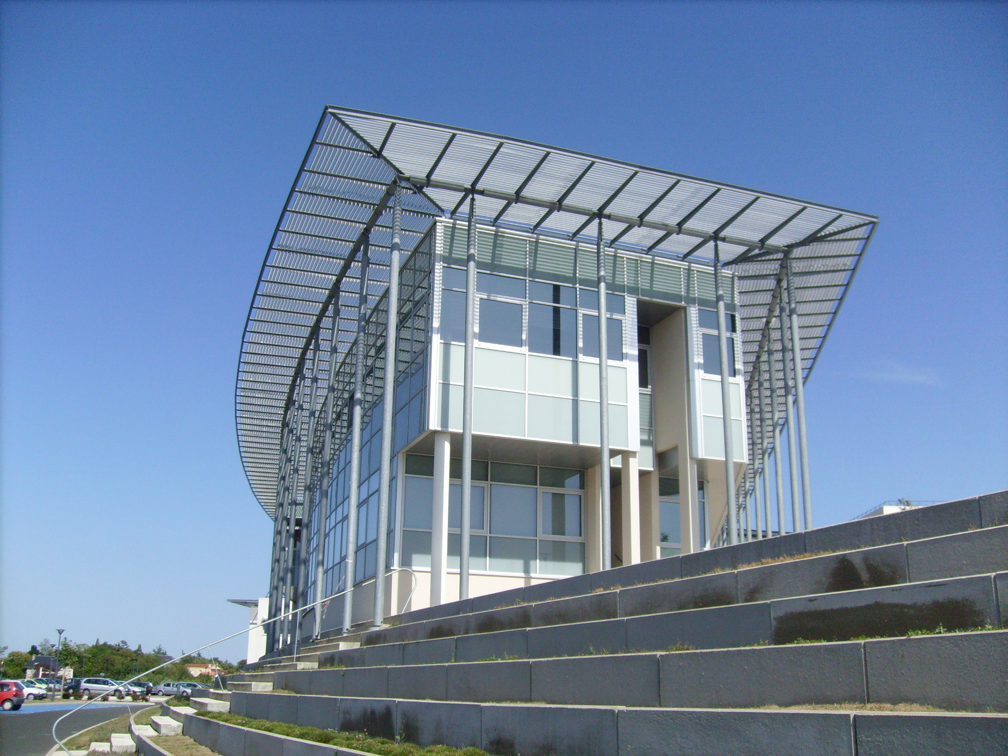 Le CHS (Centre hospitalier de Saintonge) à Saintes. Le pavillon Santé publique - Prévention - Social